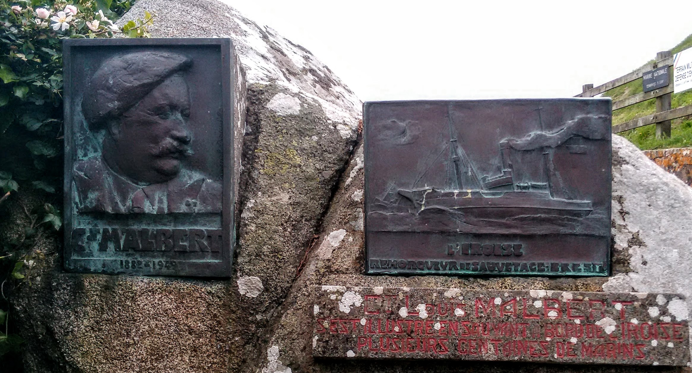 Stèle en l'honneur du commandant Louis Malbert, capitaine de l'Iroise, à Saint-Quay-Portrieux (22) - Gravure : « Commandant Louis Malbert - s'est illustré en sauvant à bord de l'Iroise plusieurs centaines de marins »